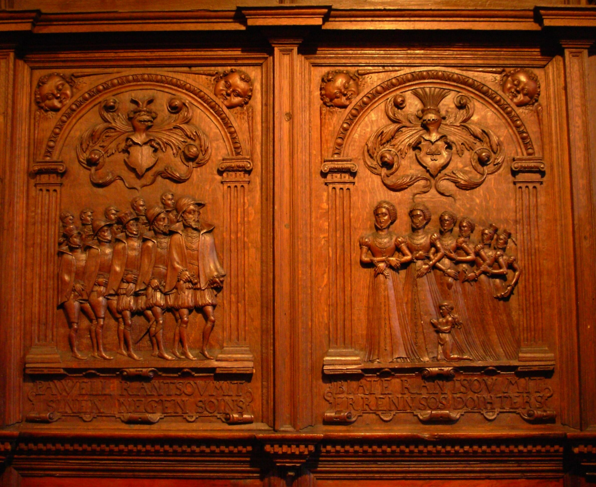 Paul und Beate Rantzau mit ihren Kindern 1578 St. Nikolai, Eckernförde